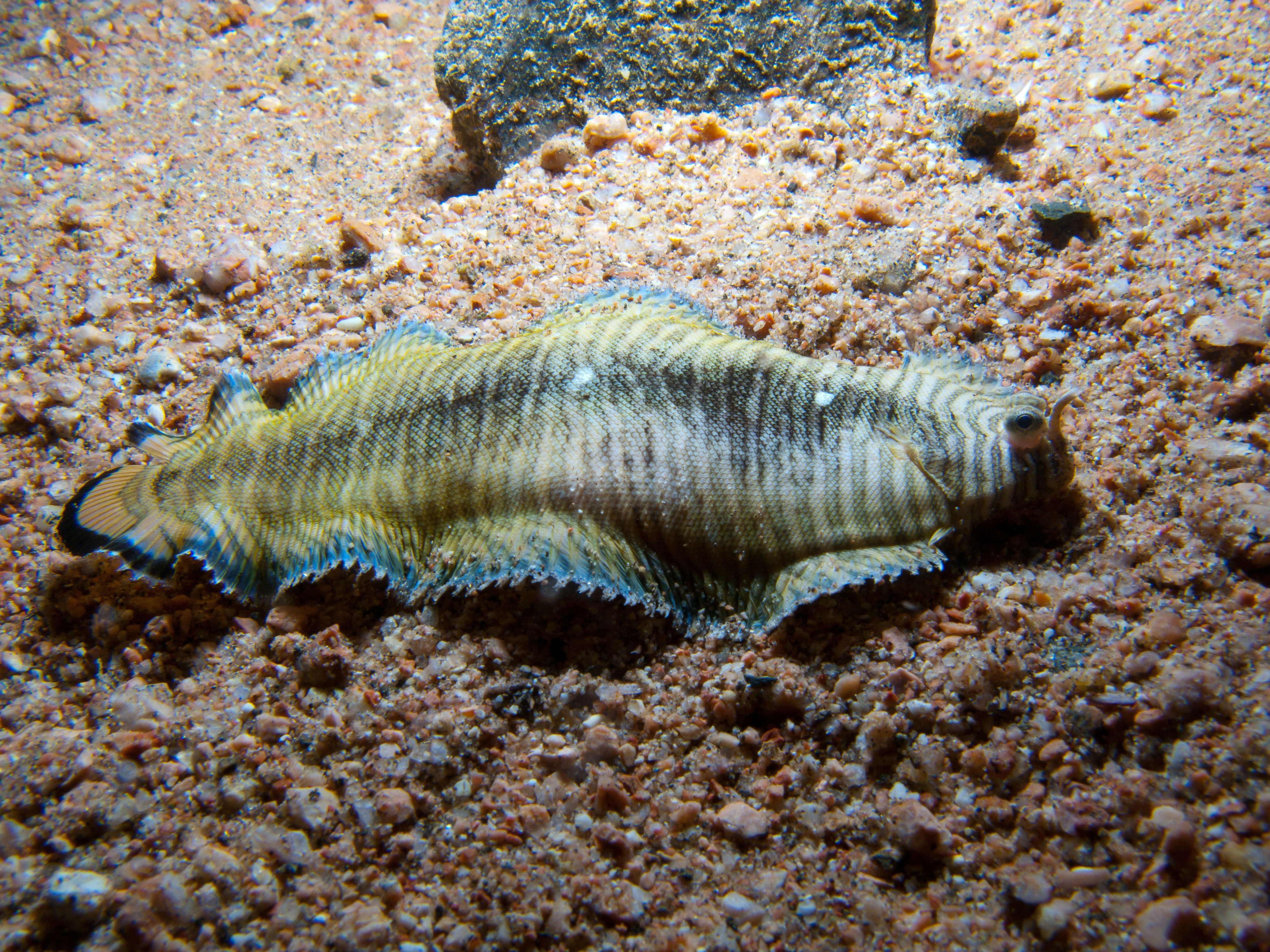 Soleichthys heterorhinos en Dahab, Egipto